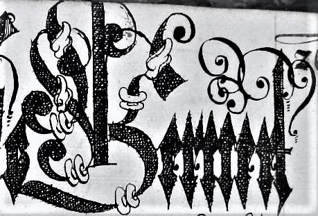 Gernert, handgeschriebener Name im Stadtbuch Arnau 1572